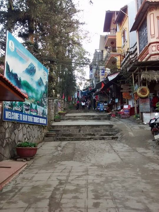 Cổng vào KDL núi Hàm Rồng, Sa Pa